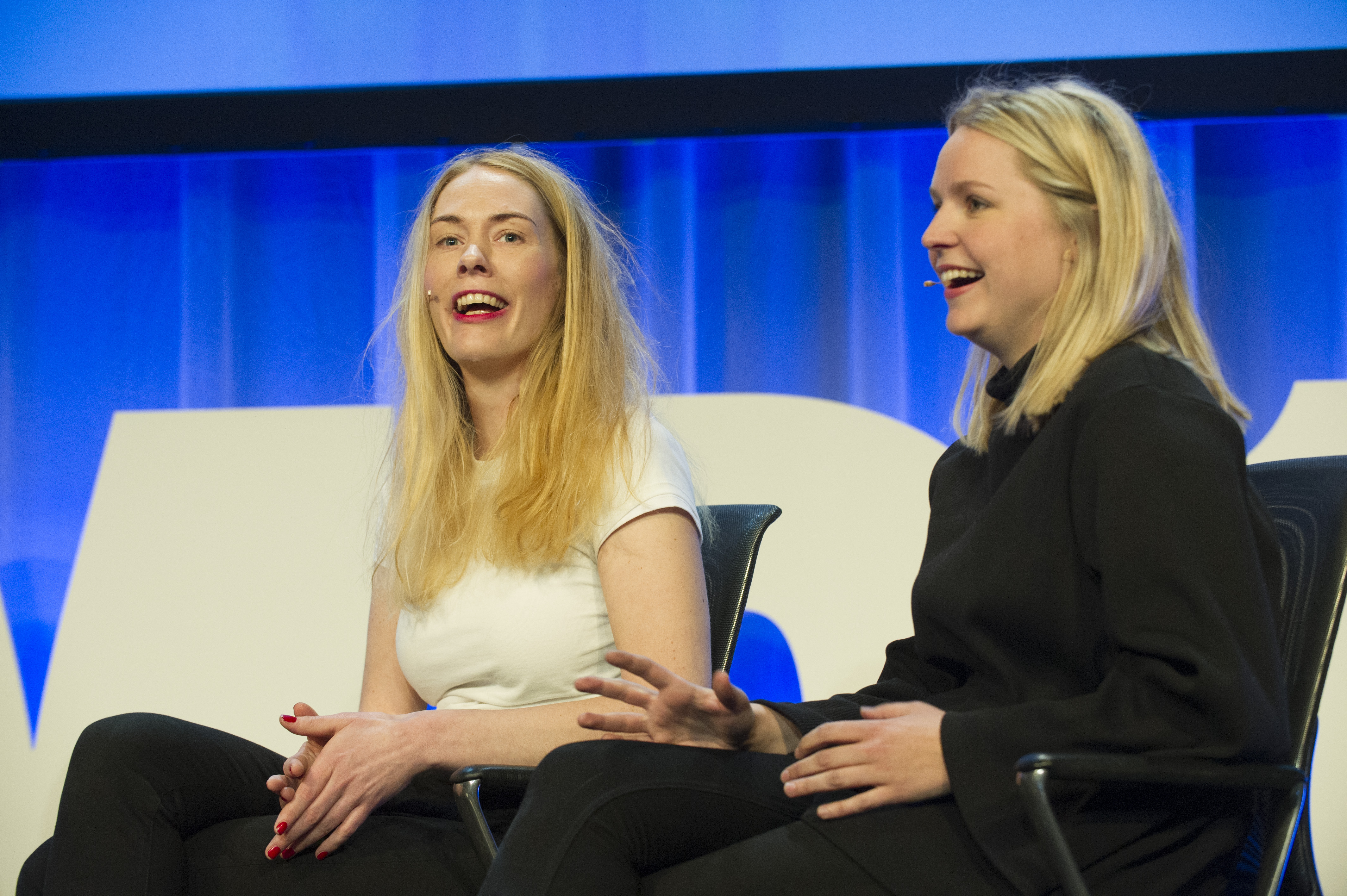 Medvirkende: Julie Andem, Mari Magnus Moderator Marte Spurkland